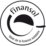 Logo du label Finansol, label de la finance solidaire